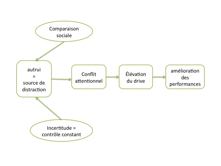 Source : Dominique Muller, Facilitation sociale et comparaison sociale : de la menace de l'auto-évaluation à la focalisation attentionnelle, U.F.R Science de l'Homme et de la Société, 2002